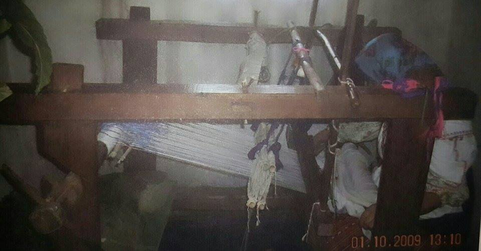 Vajza në vek duke përgatitur qimin ose sixhaden për pajën